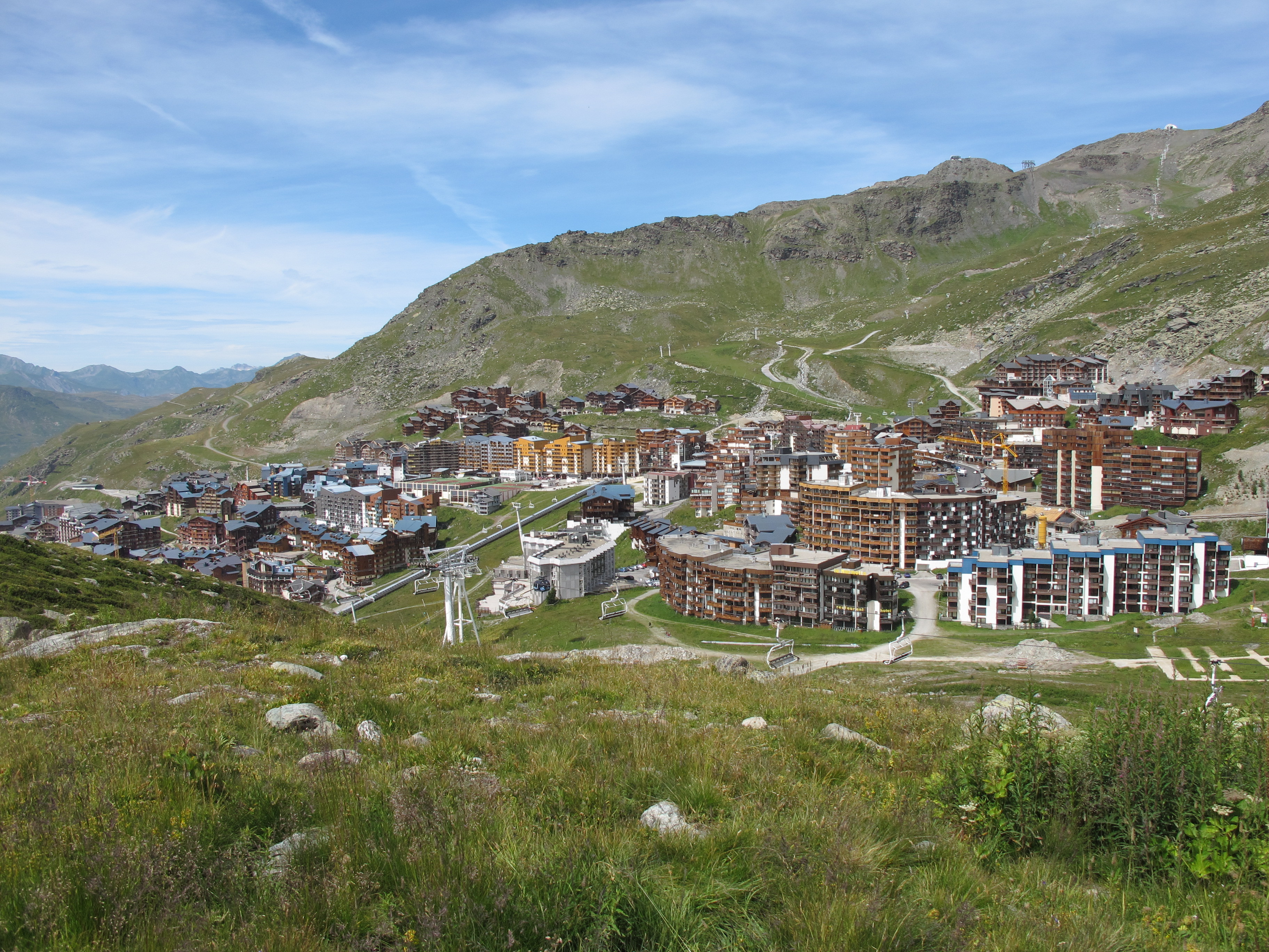 Val-Thorens